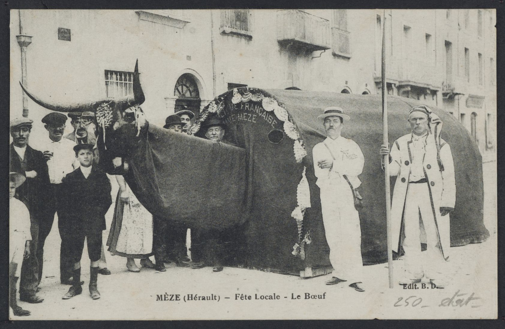 Mèze. - Fête locale - Le Bœuf, 1ère moitié du XXe siècle : carte postale